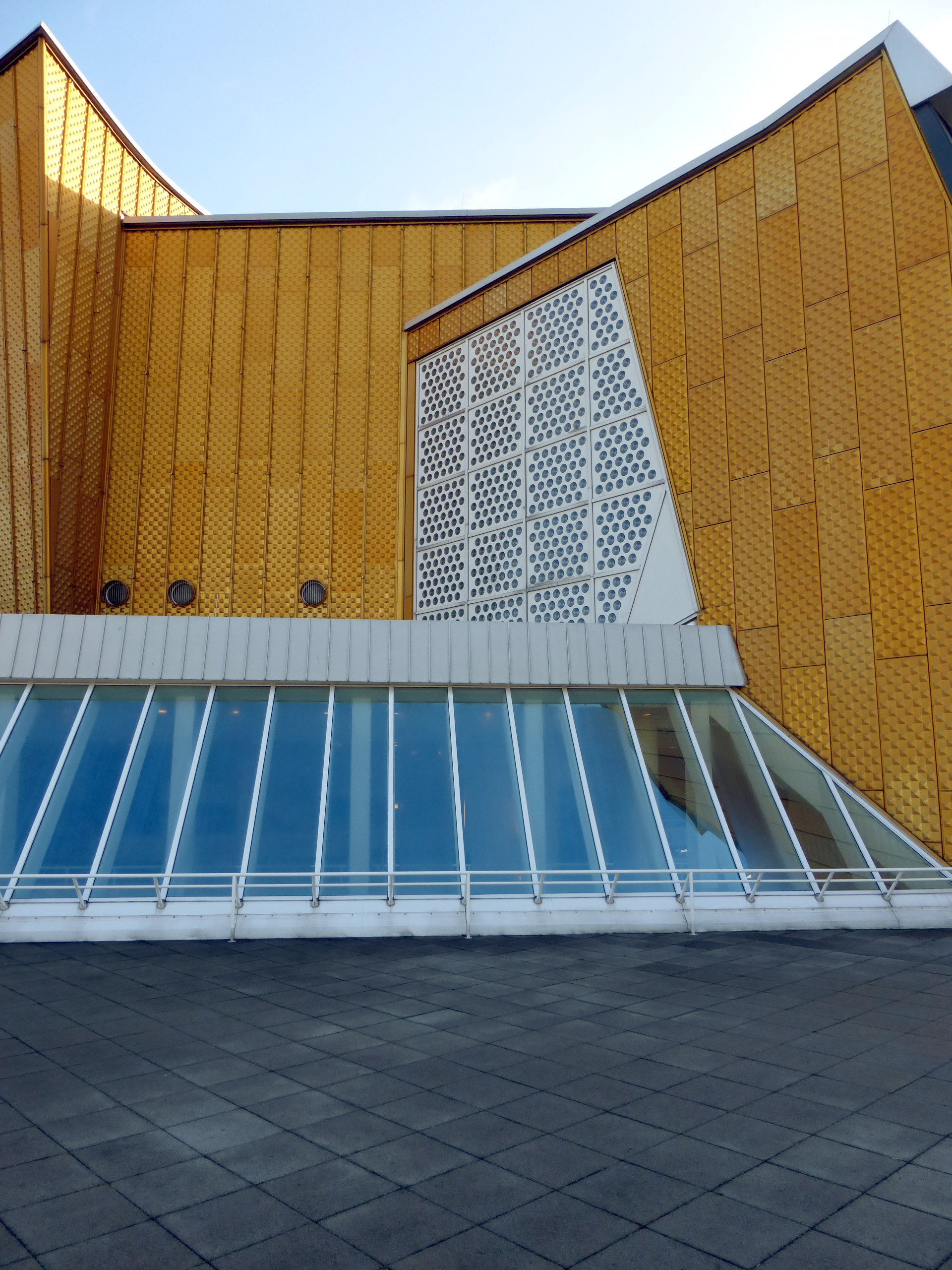 Detail der Fassade des Kammermusiksaals der Berliner Philharmonie